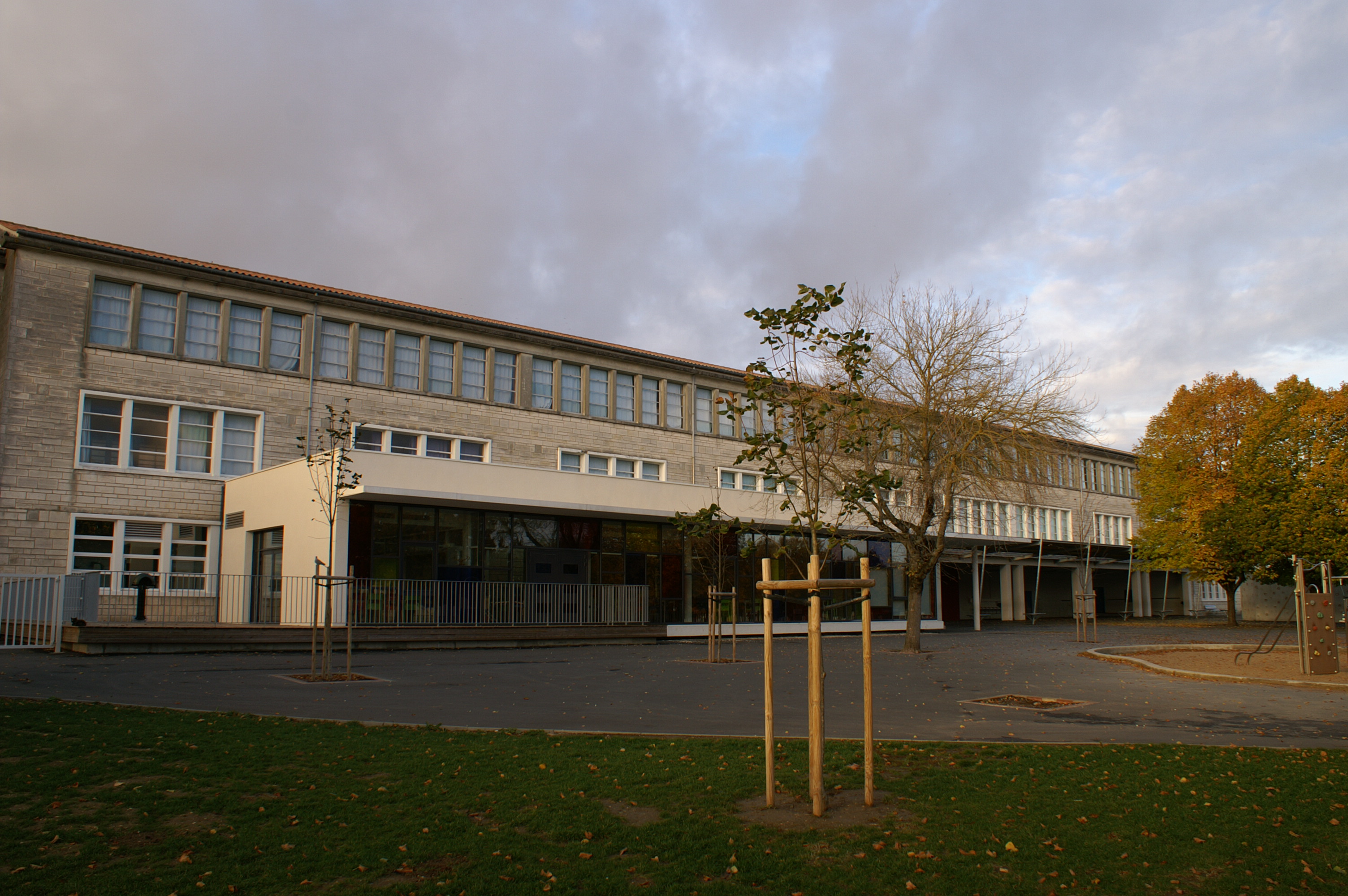 L'école primaire plaisance de Tonnay-Charente